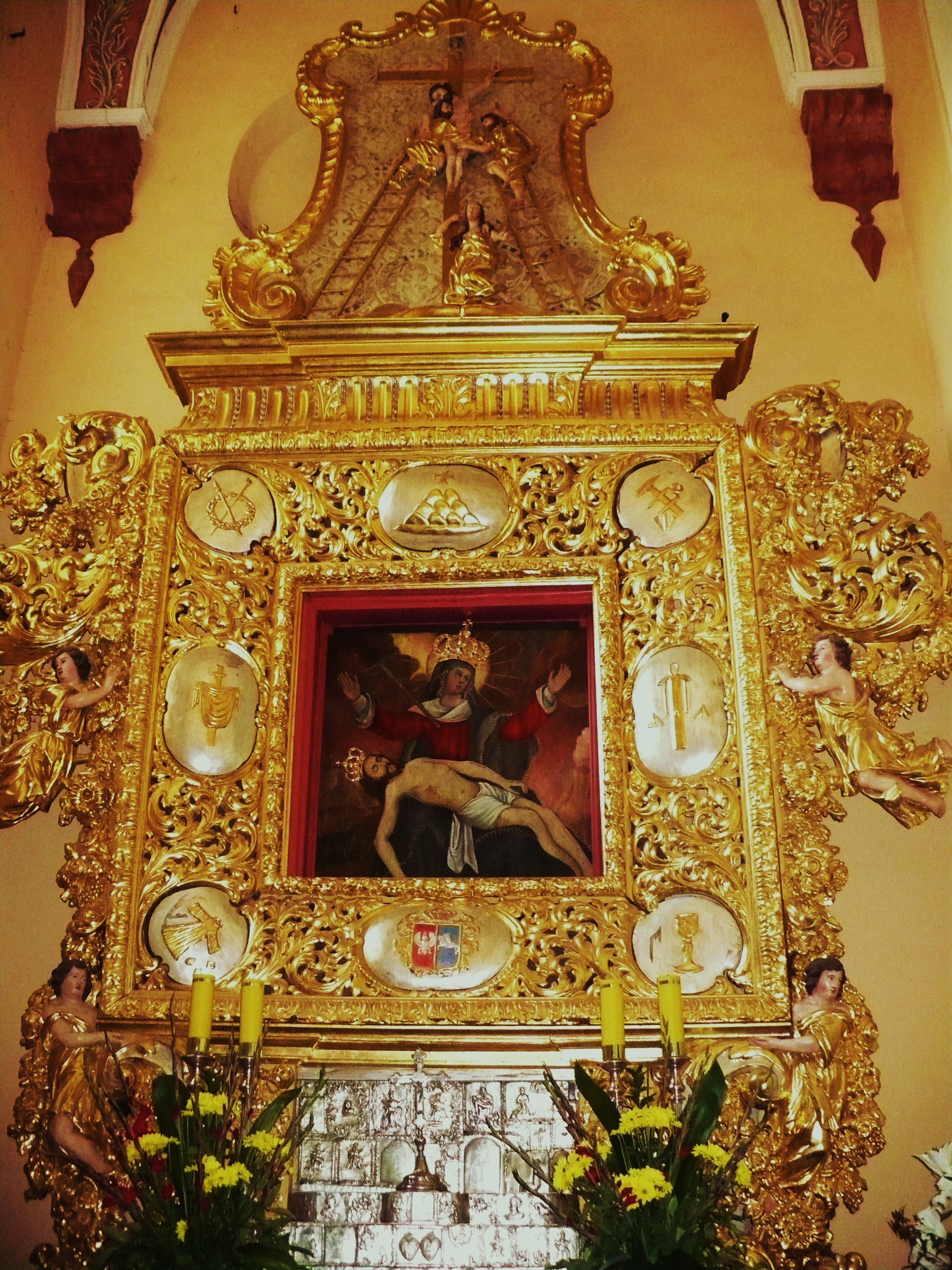 Kaplica Matki Boskiej Chełmińskiej w farze chełmińskiej